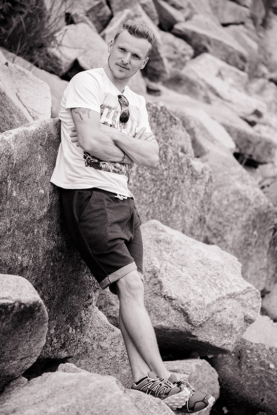 Martin Pröll, Fotograf für Hochzeit, Porträt und Architektur aus Freistadt, Oberösterreich.